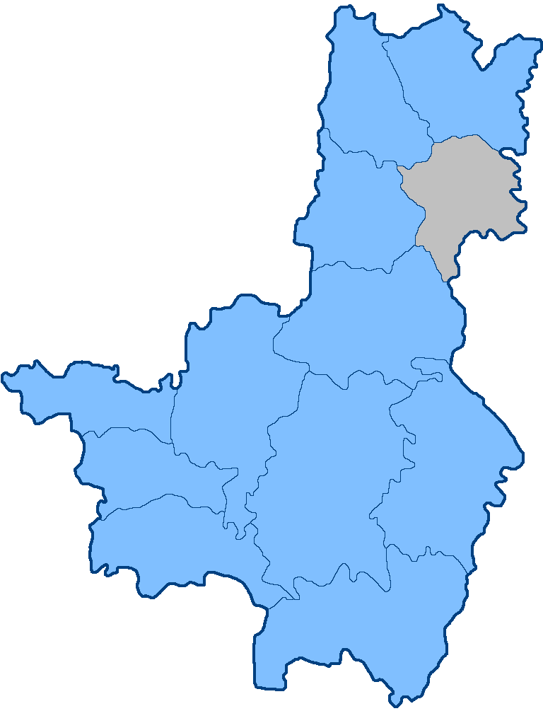 Спасский уезд на карте Тамбовской губернии